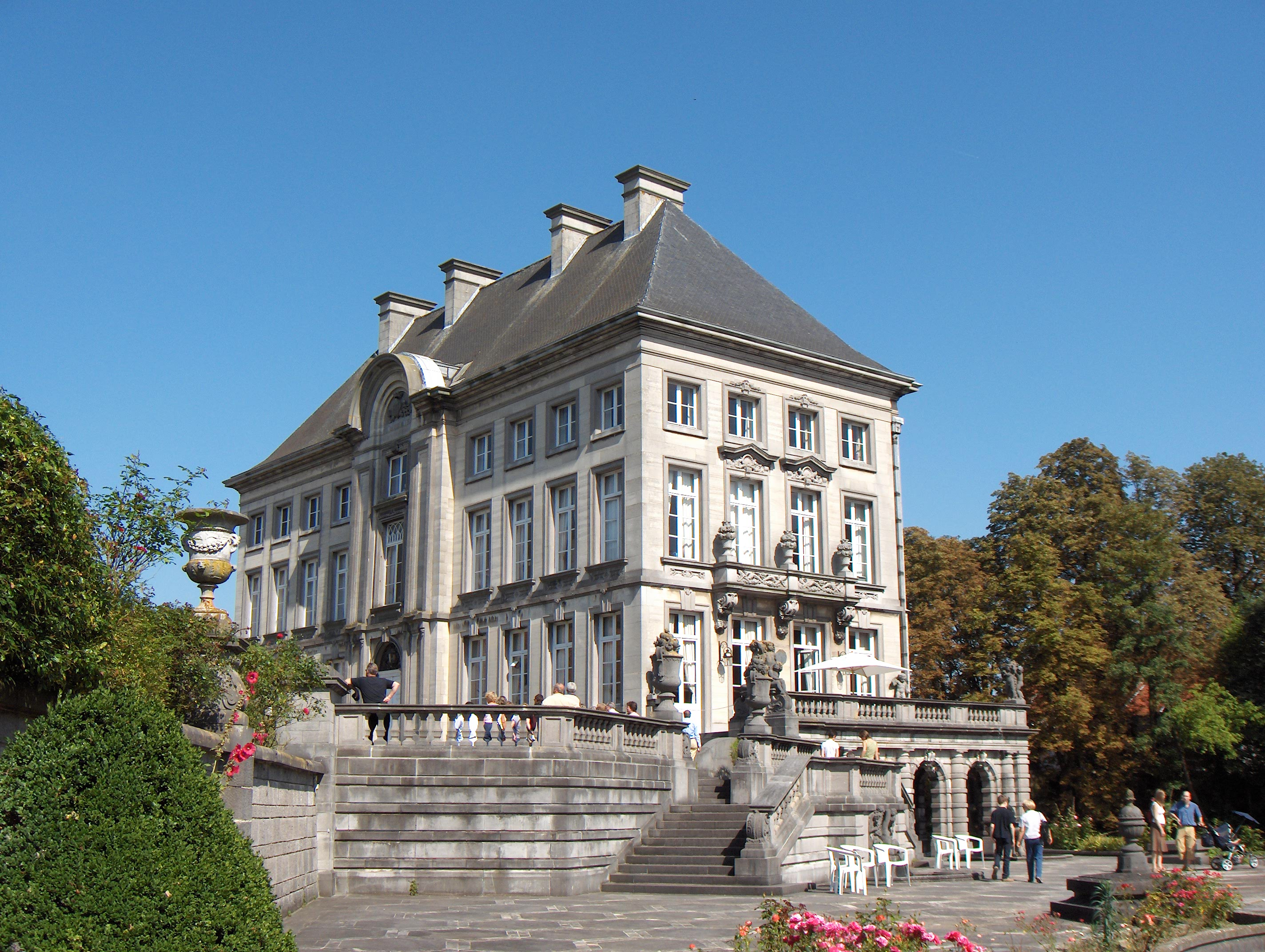 Feluy, Ortsteil der Gemeinde Seneffe, Prov. Hennegau (Belgien), Schloss mit Palast des späten 18. Jh.s.